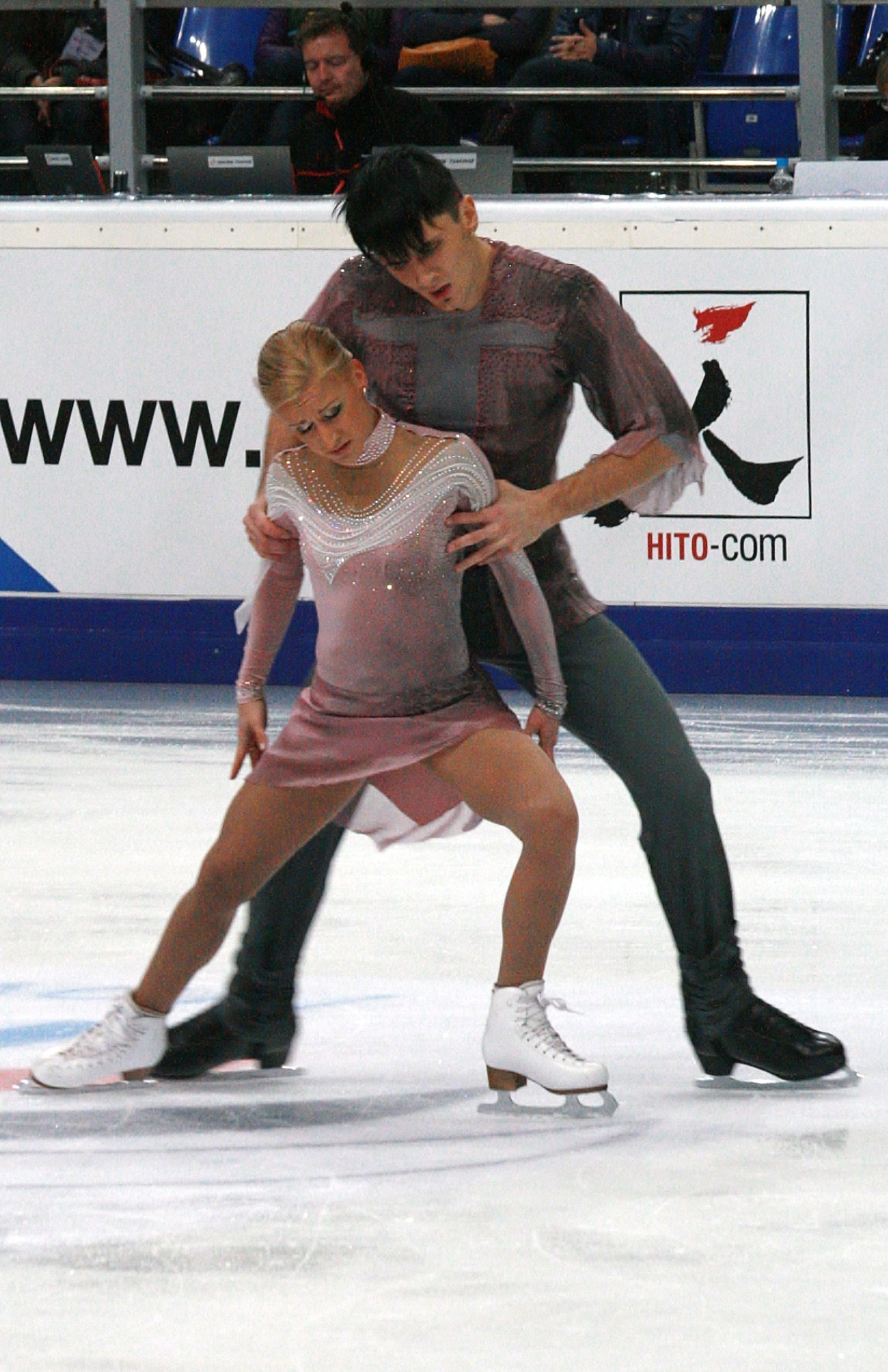 Татьяна Волосожар и Максим Траньков на Кубке Ростелекома 2012. Произвольная программа.